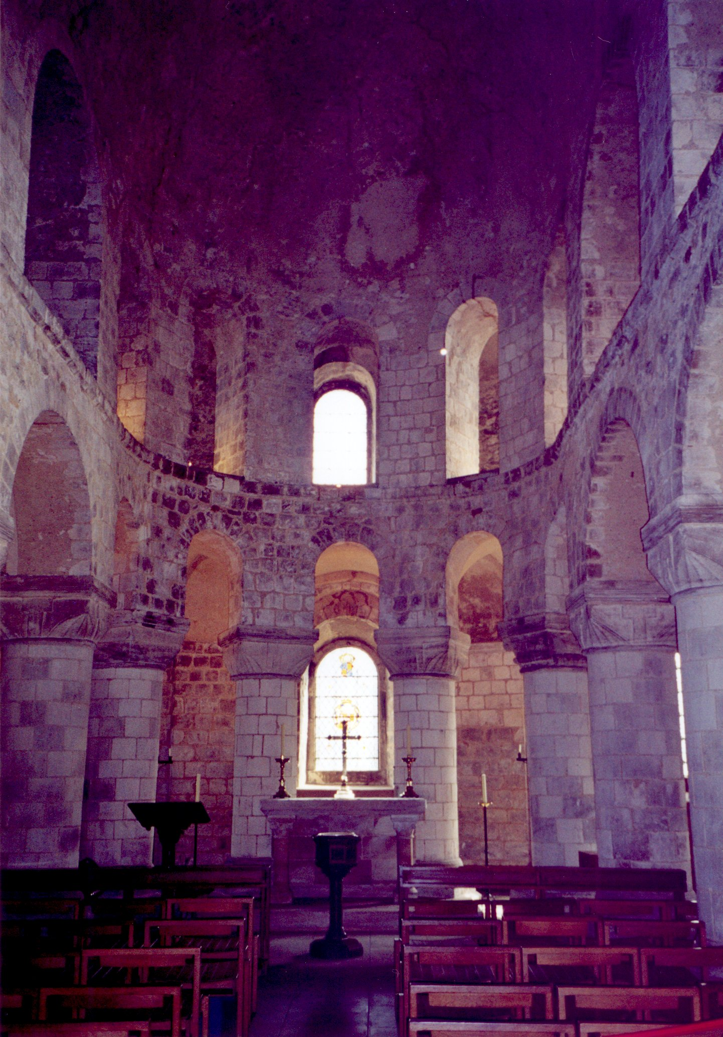 Kirche im White Tower des Tower von London.